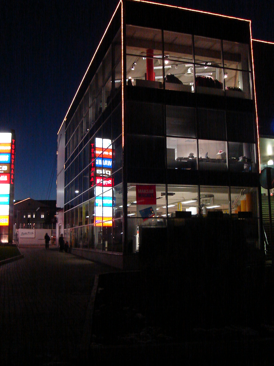 Cenrum miasta Jõhvi, Estonia. Autor: sihi